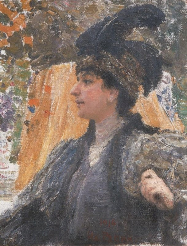 Портрет художницы В.В. Верёвкиной